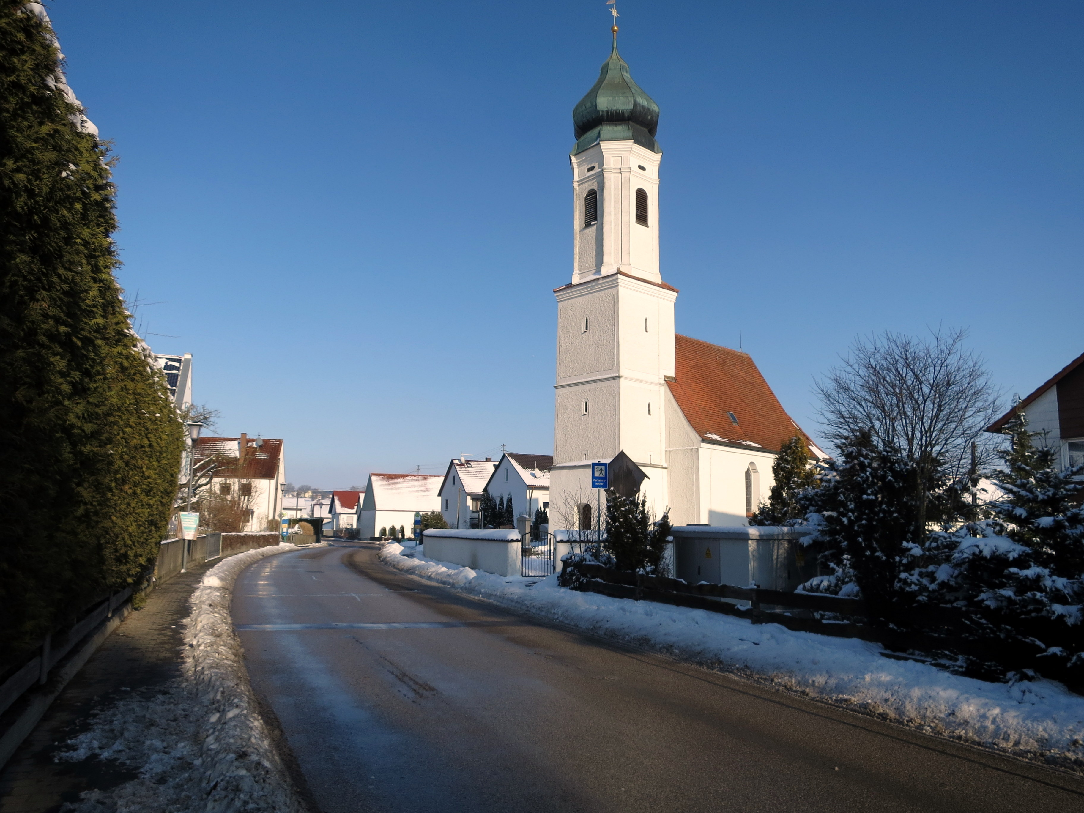 Die Filialkirche von Appercha im Winter